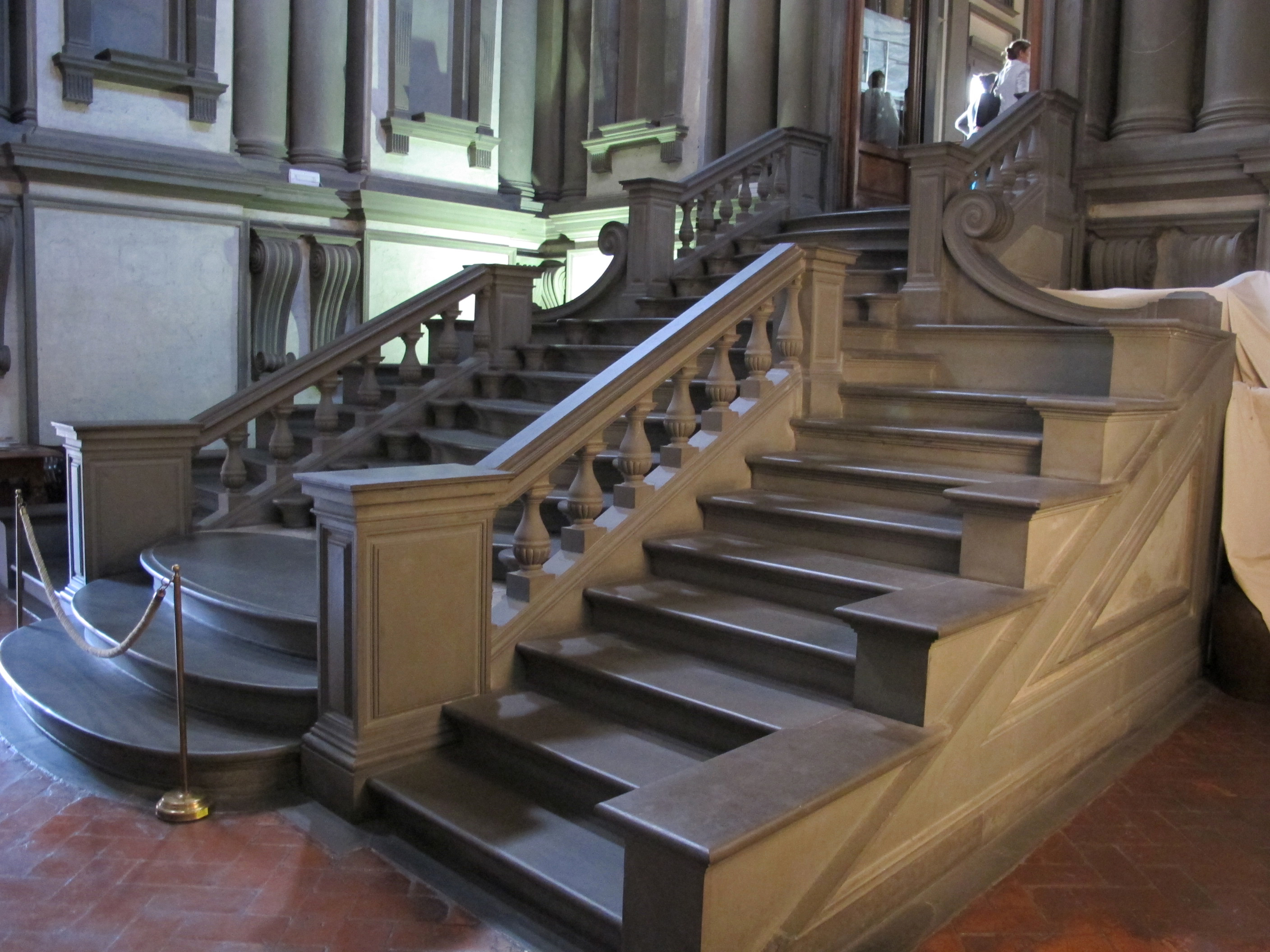 Biblioteca laurenziana, vestibolo, scalinata